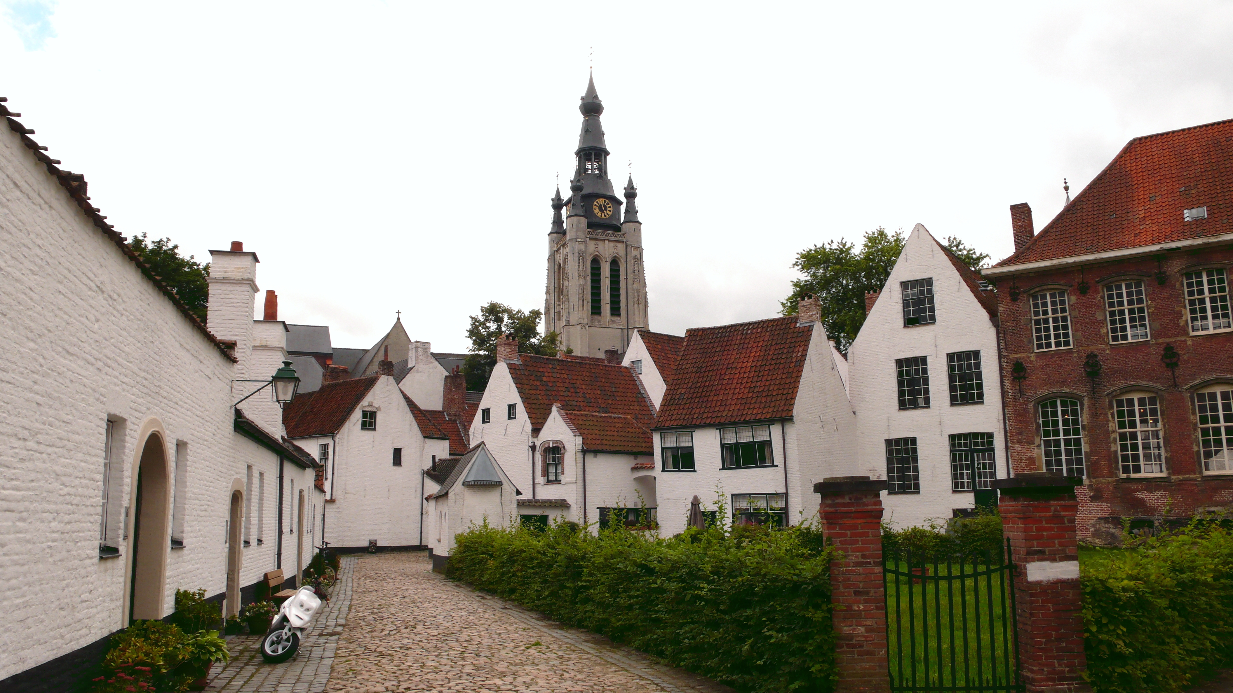 Kortrijk, Beginenhof